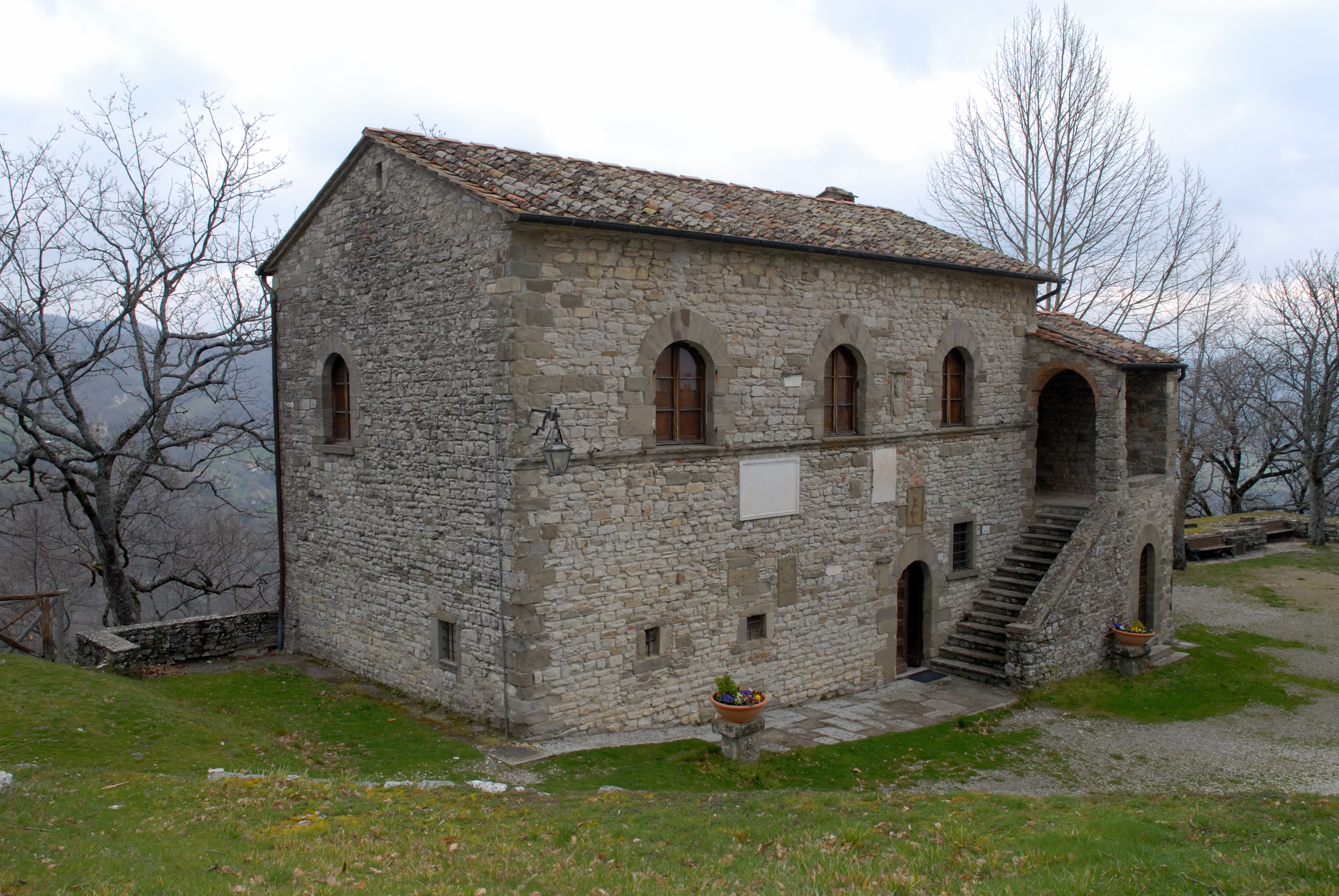 Caprese Michelangelo, Palazzo del Podestà. Museo Michelangiolesco.